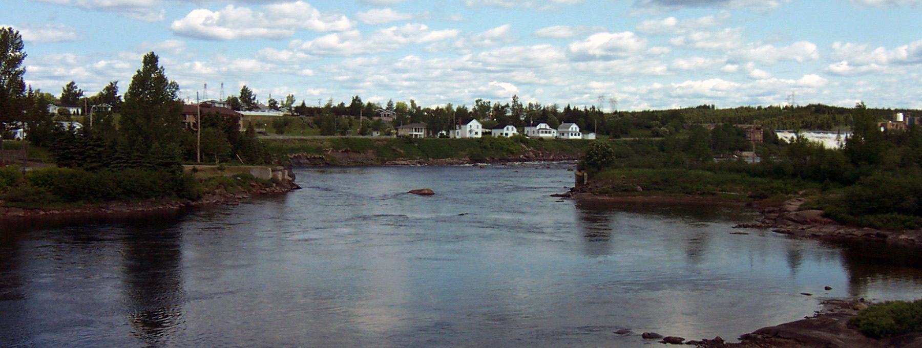 Photo pris des ponts sur Portage des mousses à Port-cartier, orienté vers le nord. On voit ici la rivière aux rochers avec sa chute, le piège aux saumons avec une partie de l'île Patterson nord à droite, et une partie de Port-cartier ouest a gauche.